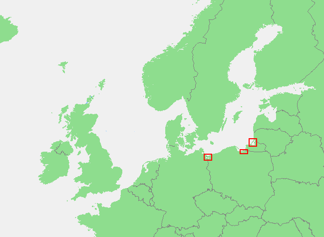 3 haffen